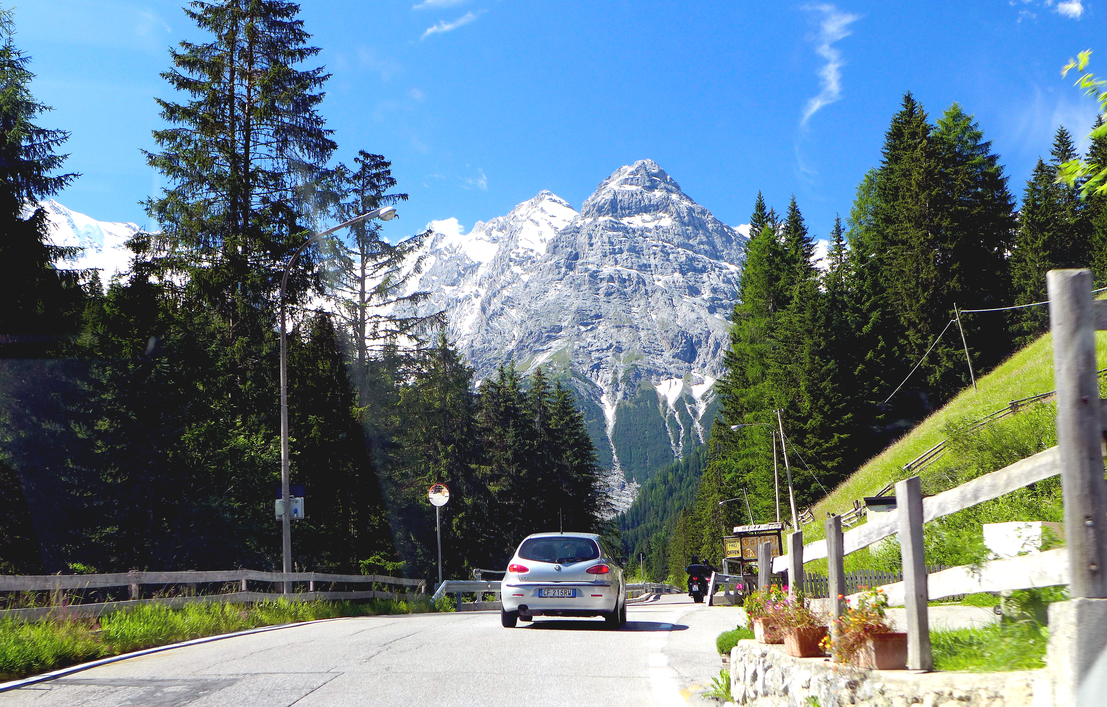 Stelvio-hágó, északi hágóút (Prad am Stilfserjoch, Olaszország)